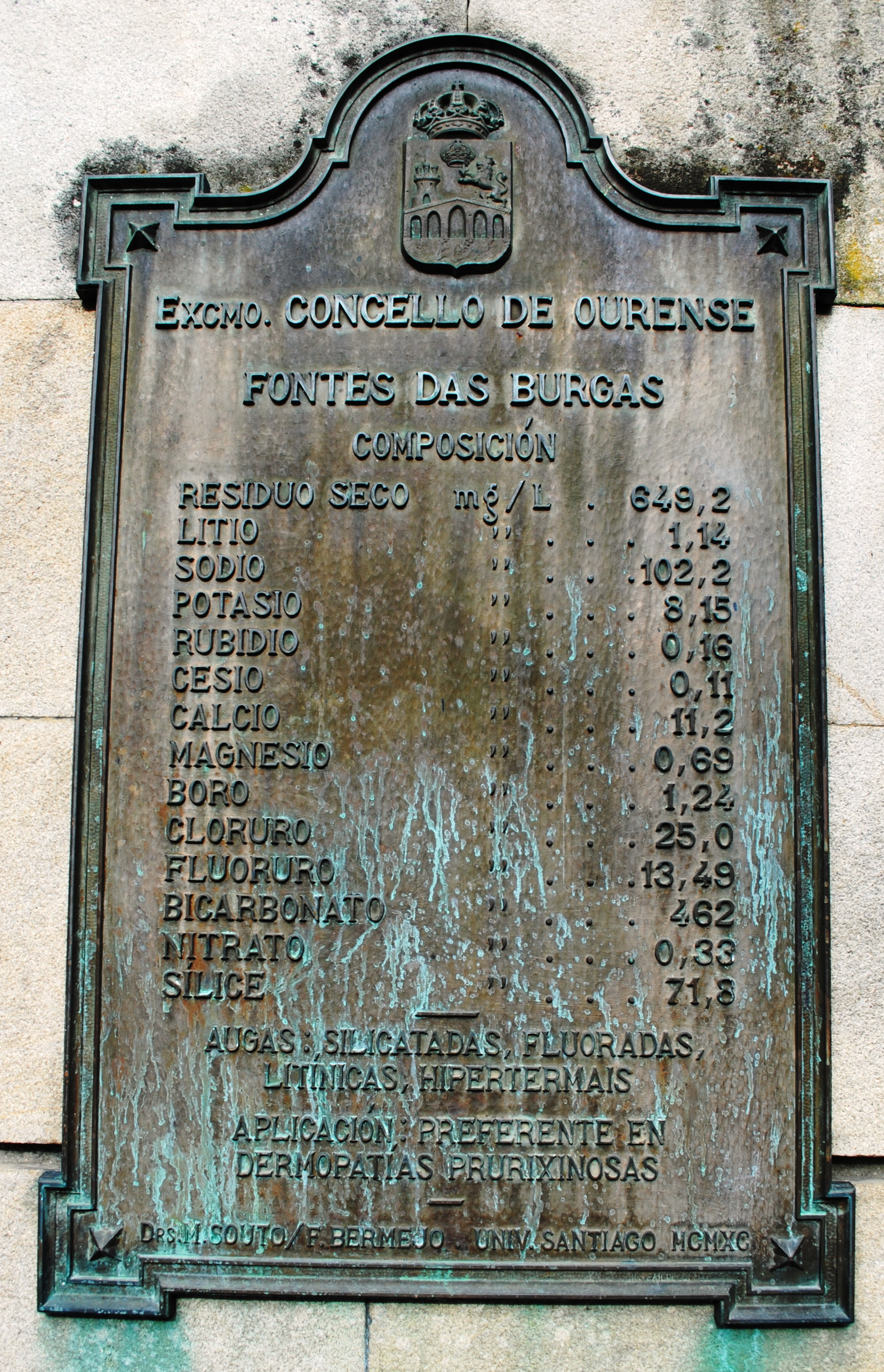 see title